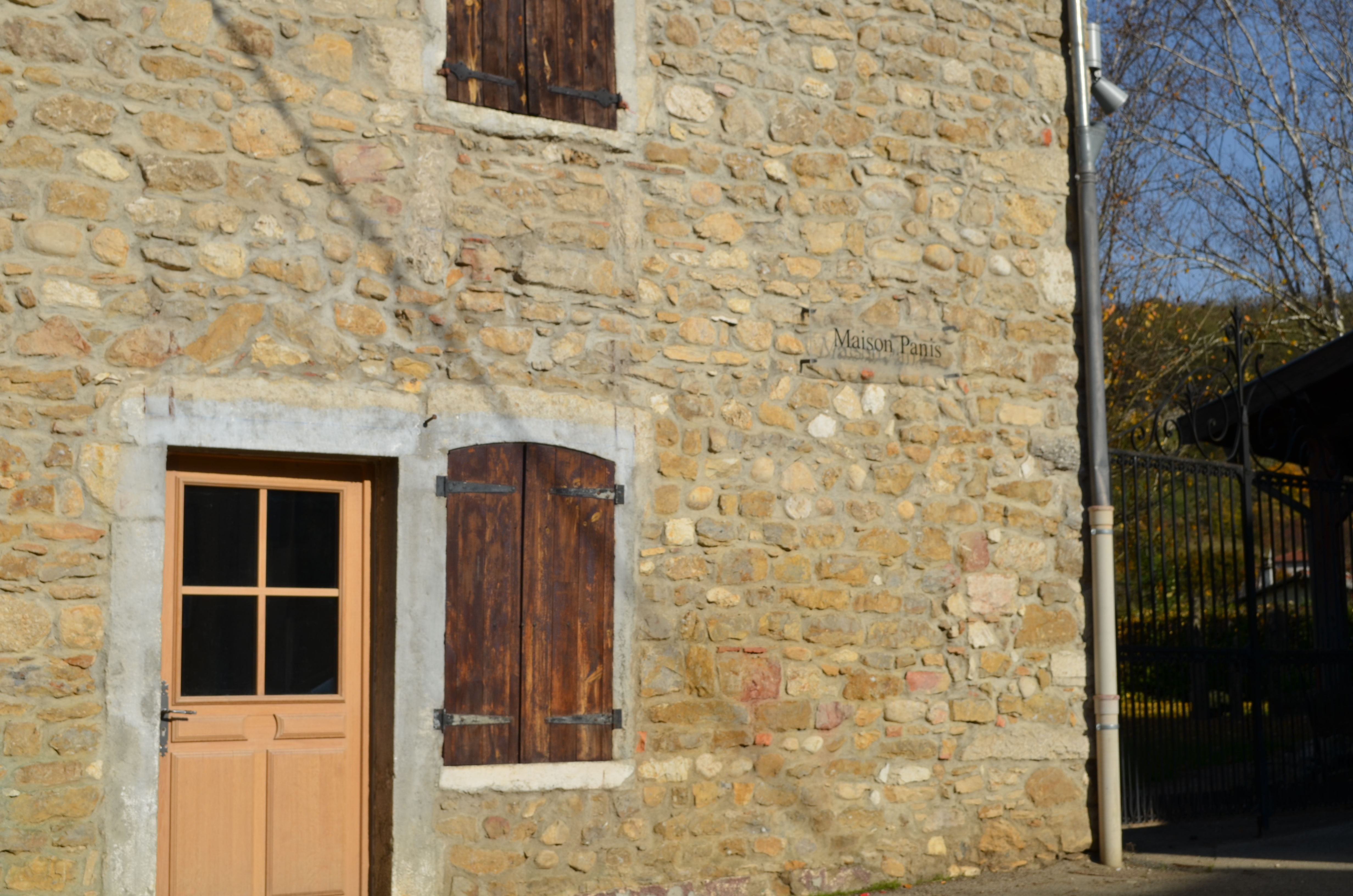 Photographie de Vaux-en-Bugey, Ain, France.